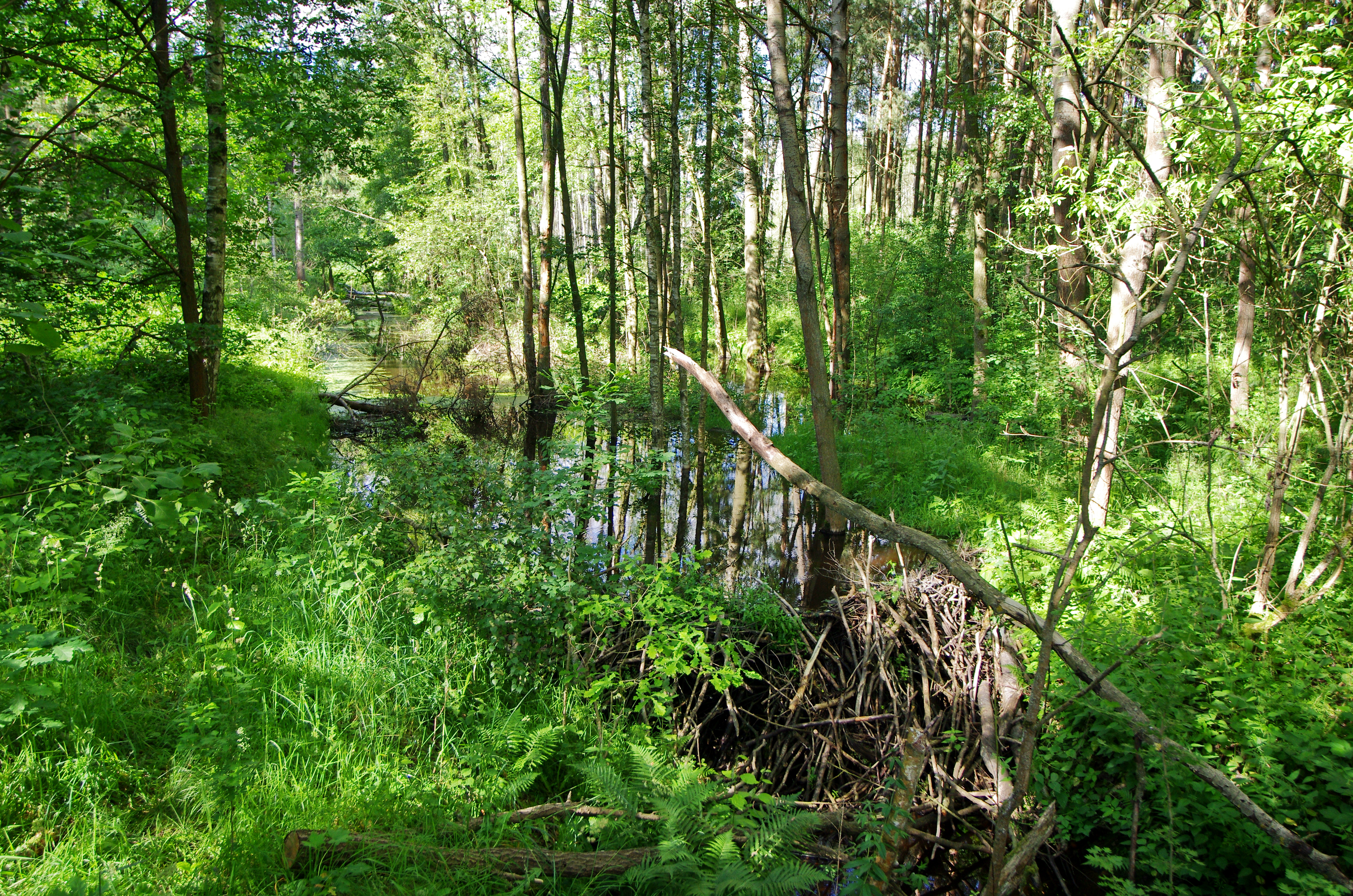 Lesní potok, levý přítok Ohře, bobří hráz poblíž vodní nádrže Skalka, okres Cheb